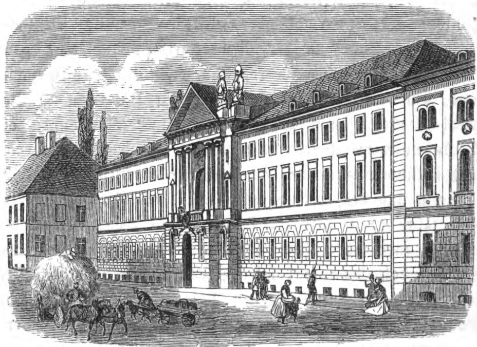 Das Kadettenhaus in Berlin (Neubau) in der Neuen Friedrichsstraße 13.